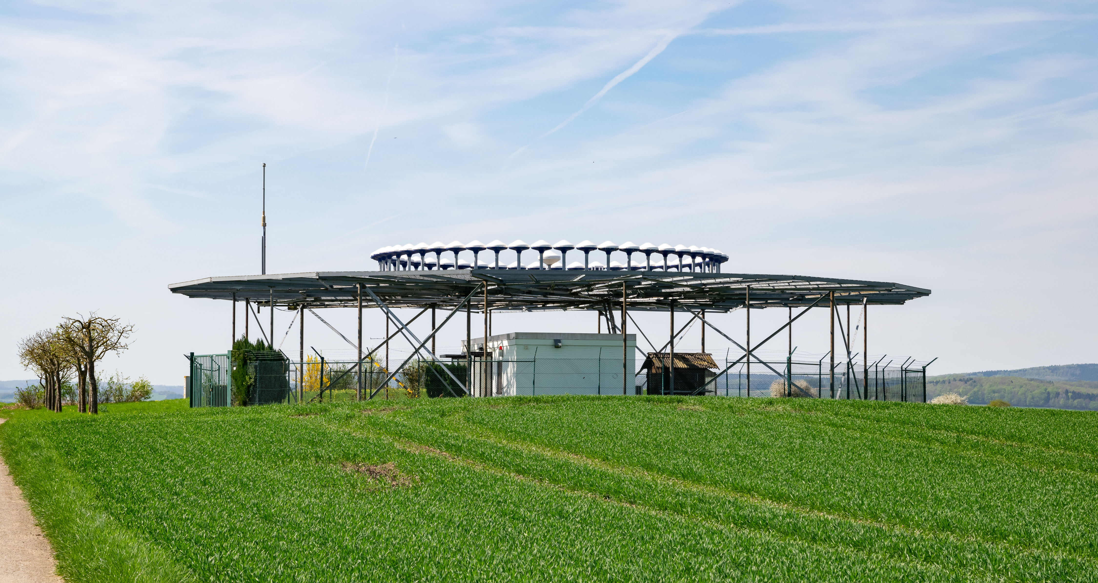 Drehfunkfeuer DVOR/DME (WRB) bei Warburg